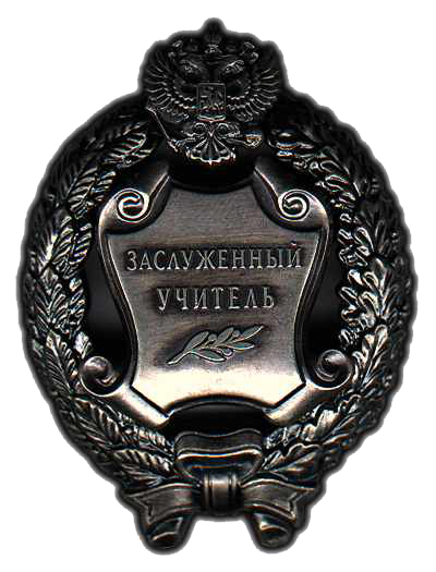 Знак почетного звания "Заслуженный учитель Российской Федерации